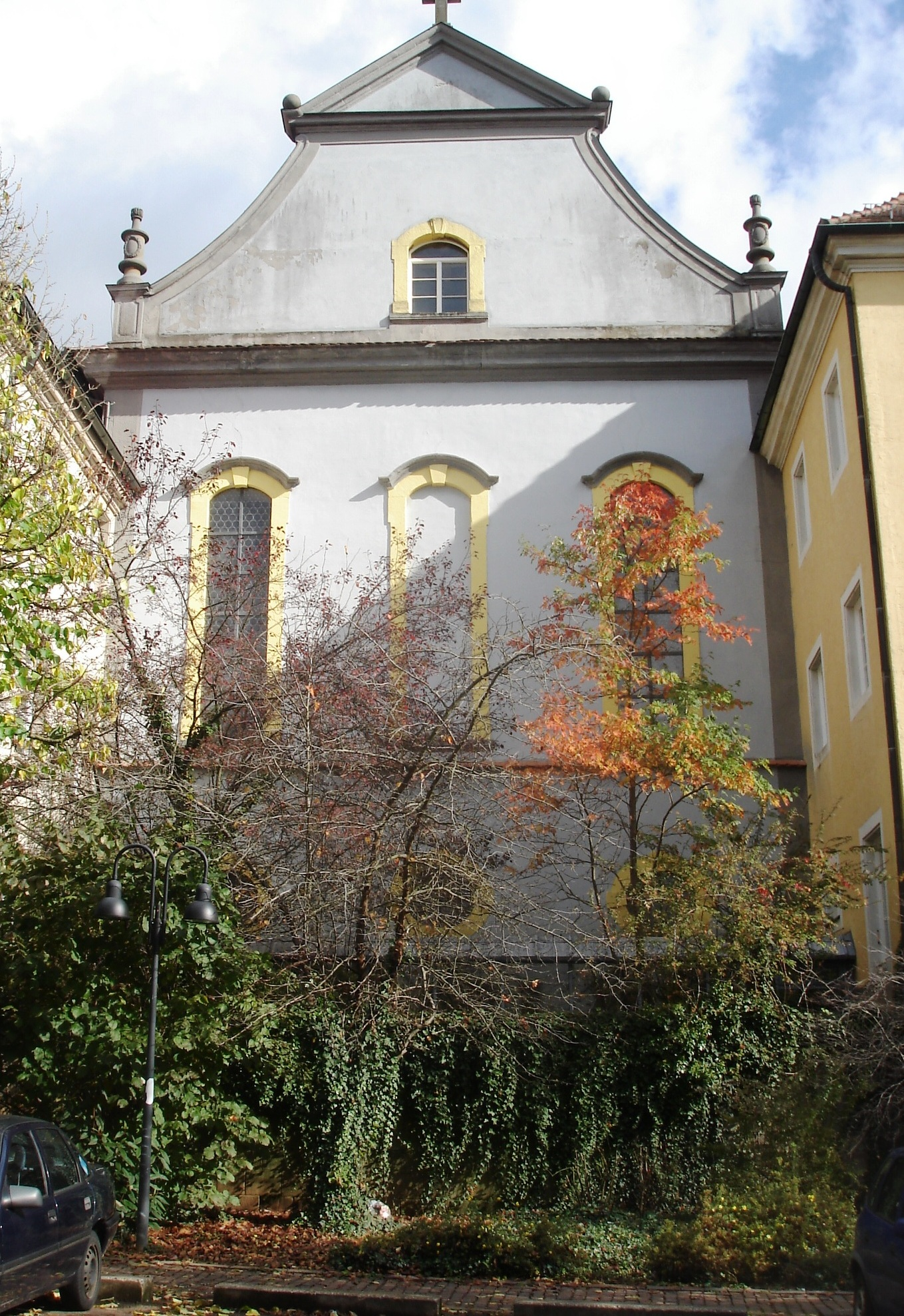 Westfassade von St. Augustinus Schwäbisch Gmünd